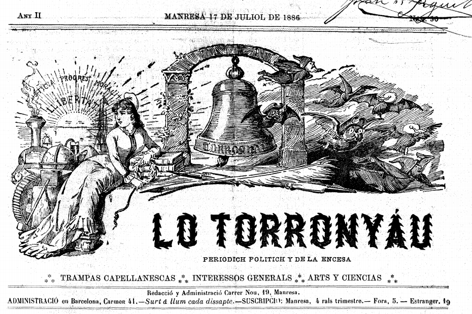 La segona capçalera del setmanai manresà